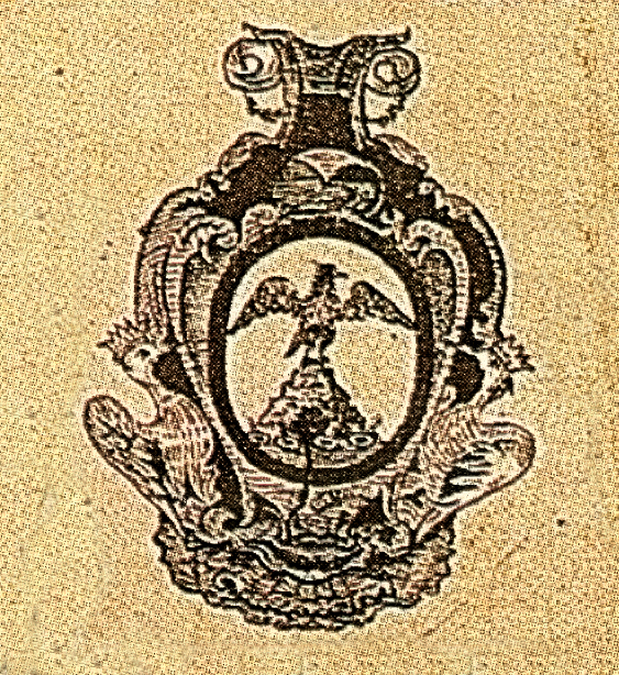 Escudo de Armas